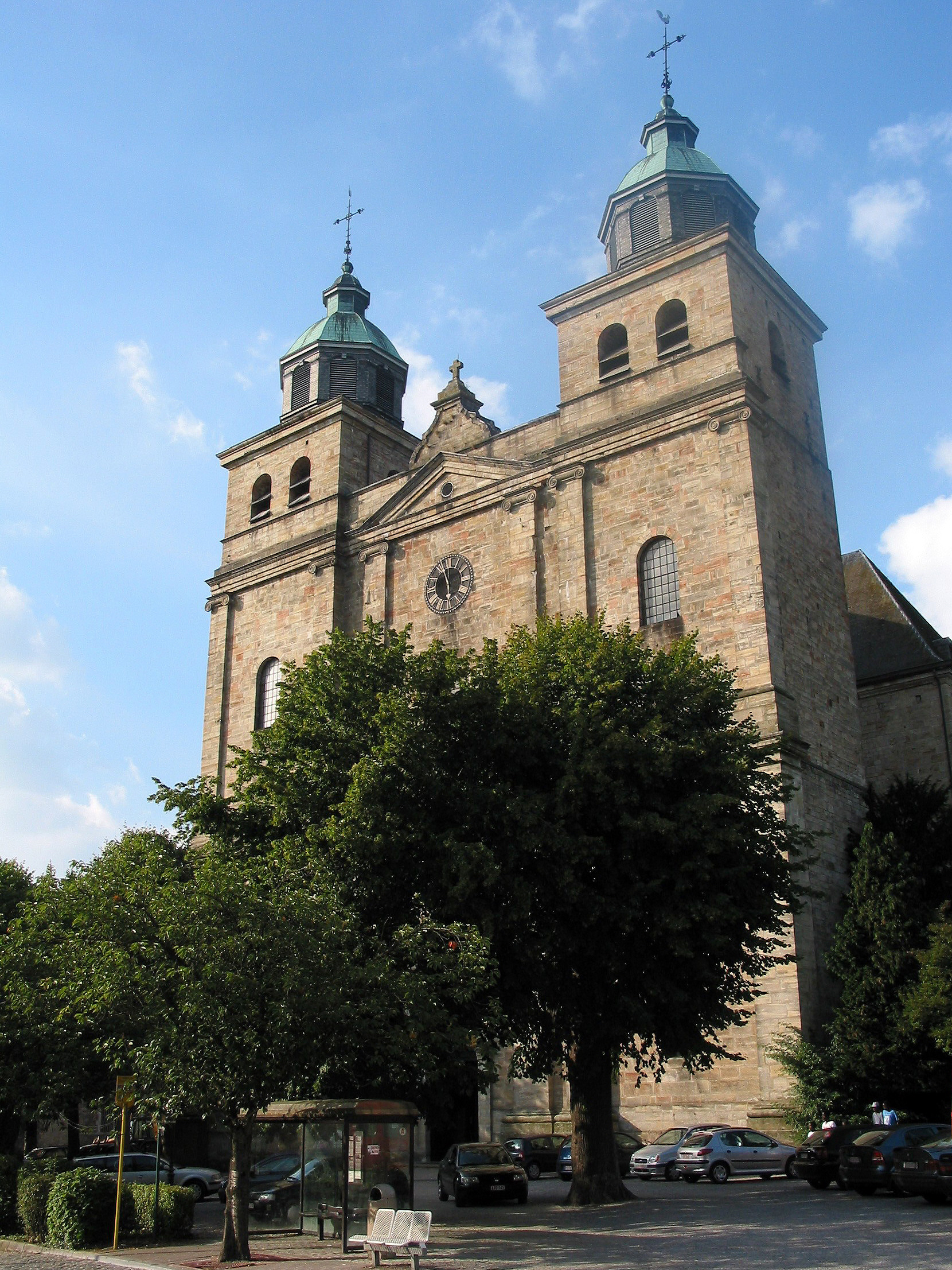 Malmedy (Belgique), la cathédrale Saints Pierre, Paul et Quirin (1775).